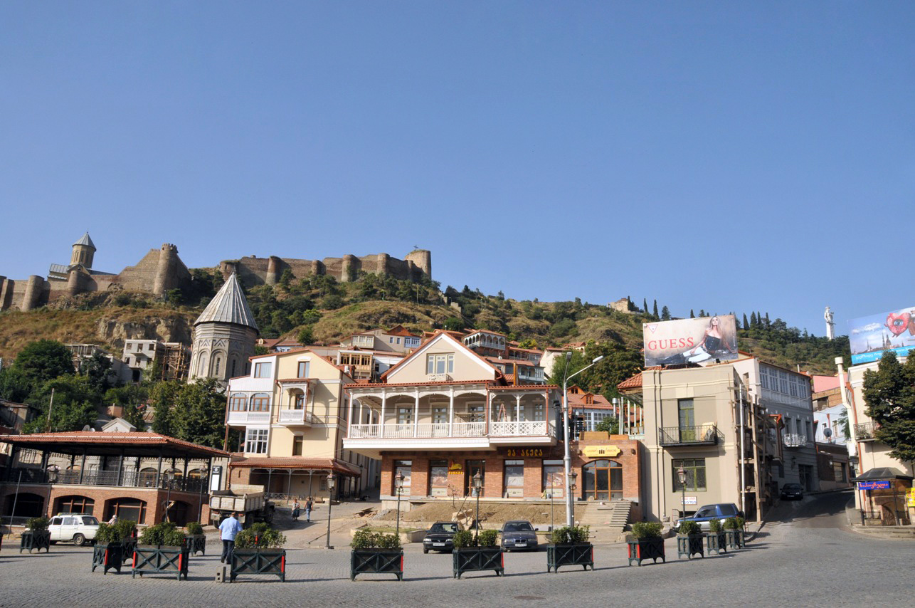 Gorgasali Sq., Tbilisi, Georgia